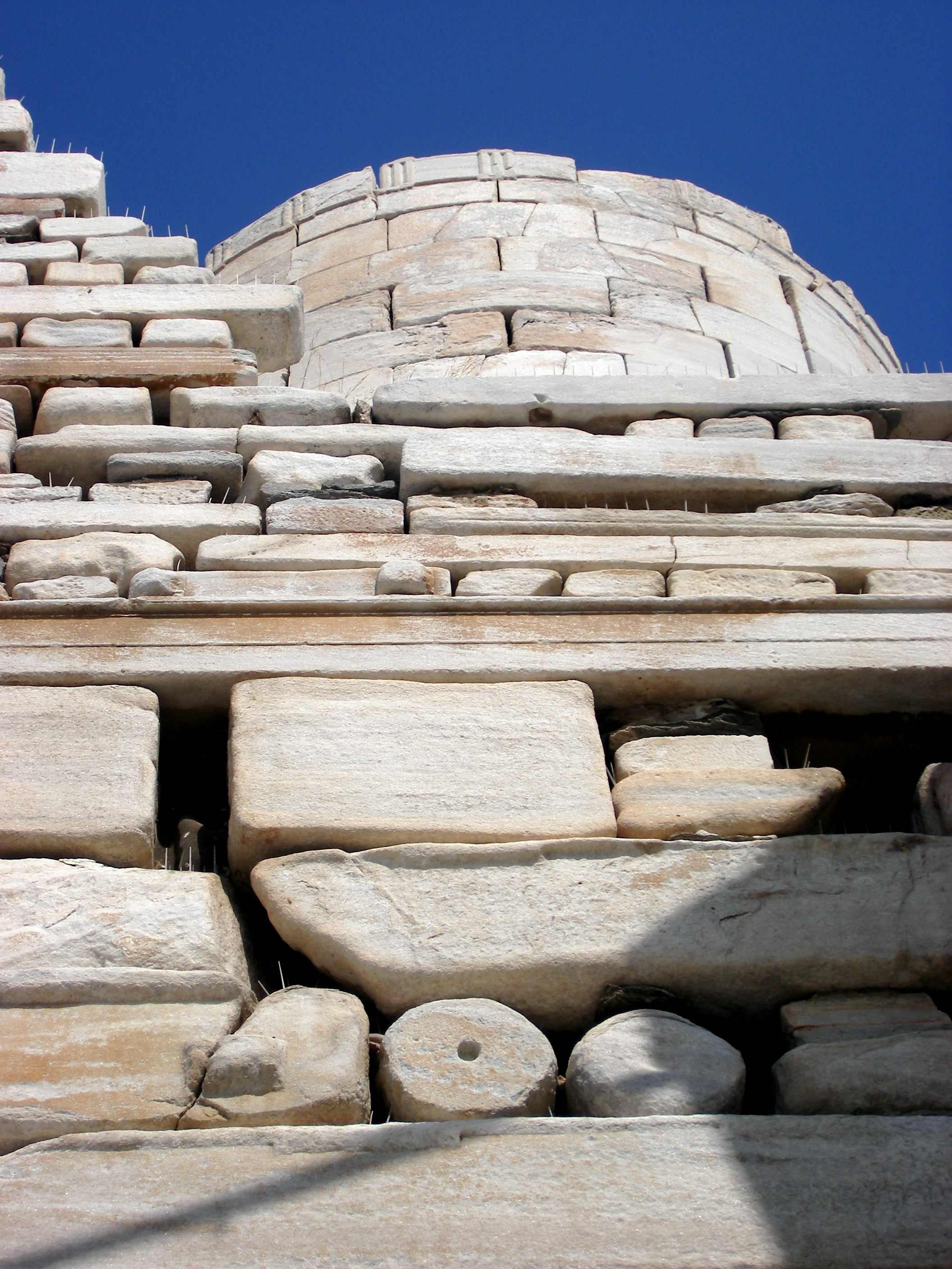 Venetian Castle, Parikia, Paros / Forteresse vénitienne, Parikia, Paros